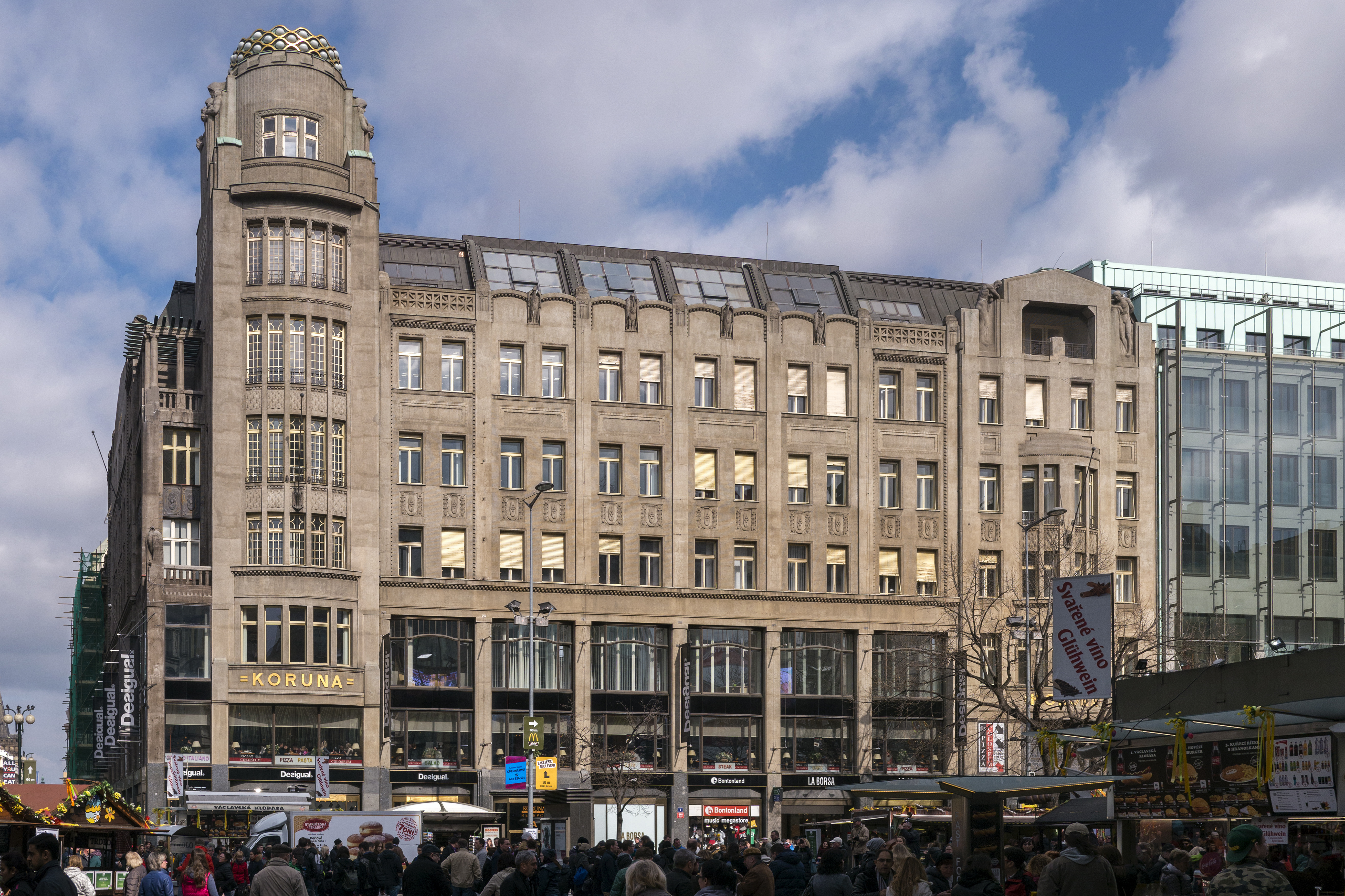 Prag Koruna Palast